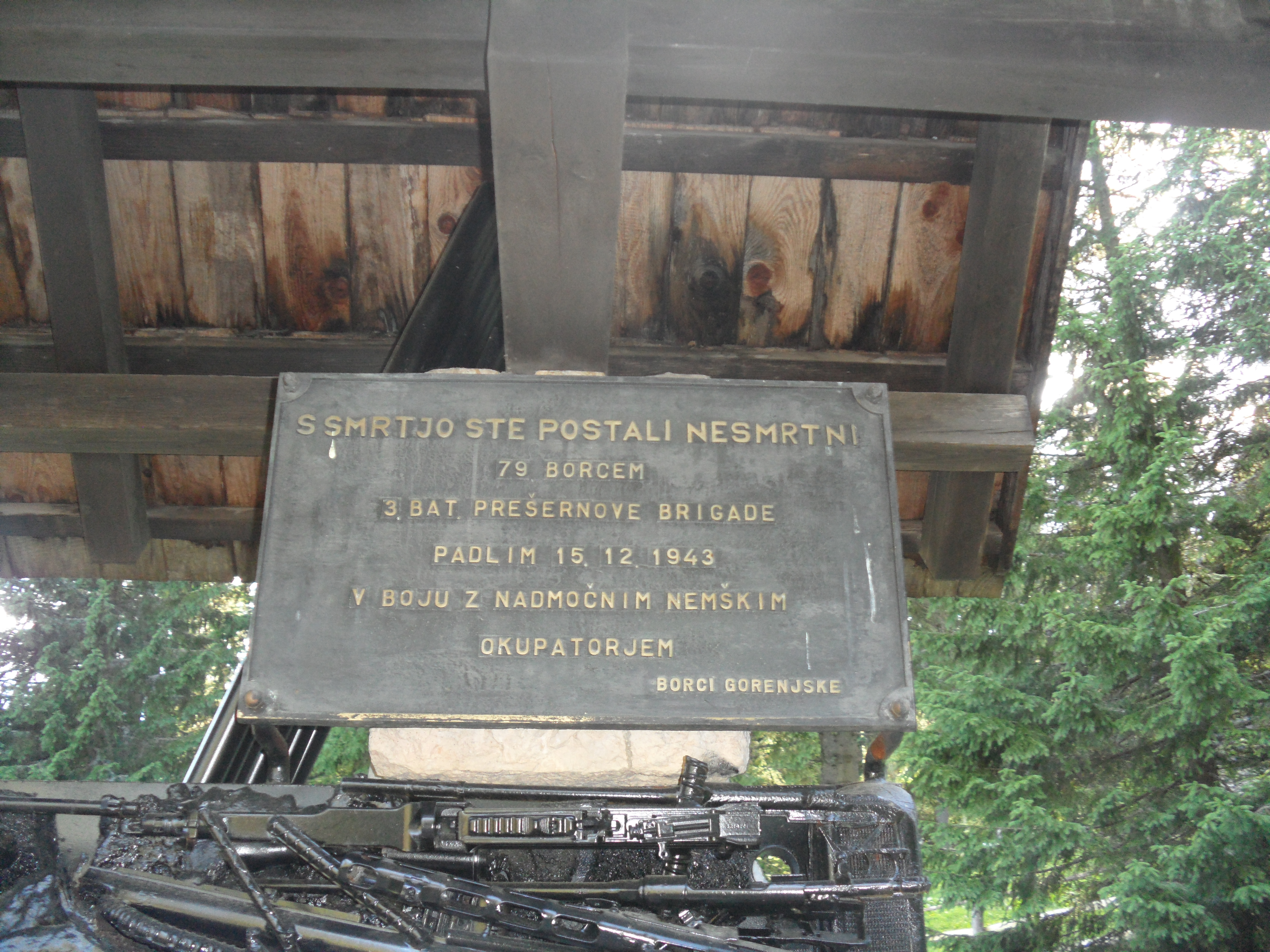 Spomenik na Pokljuki